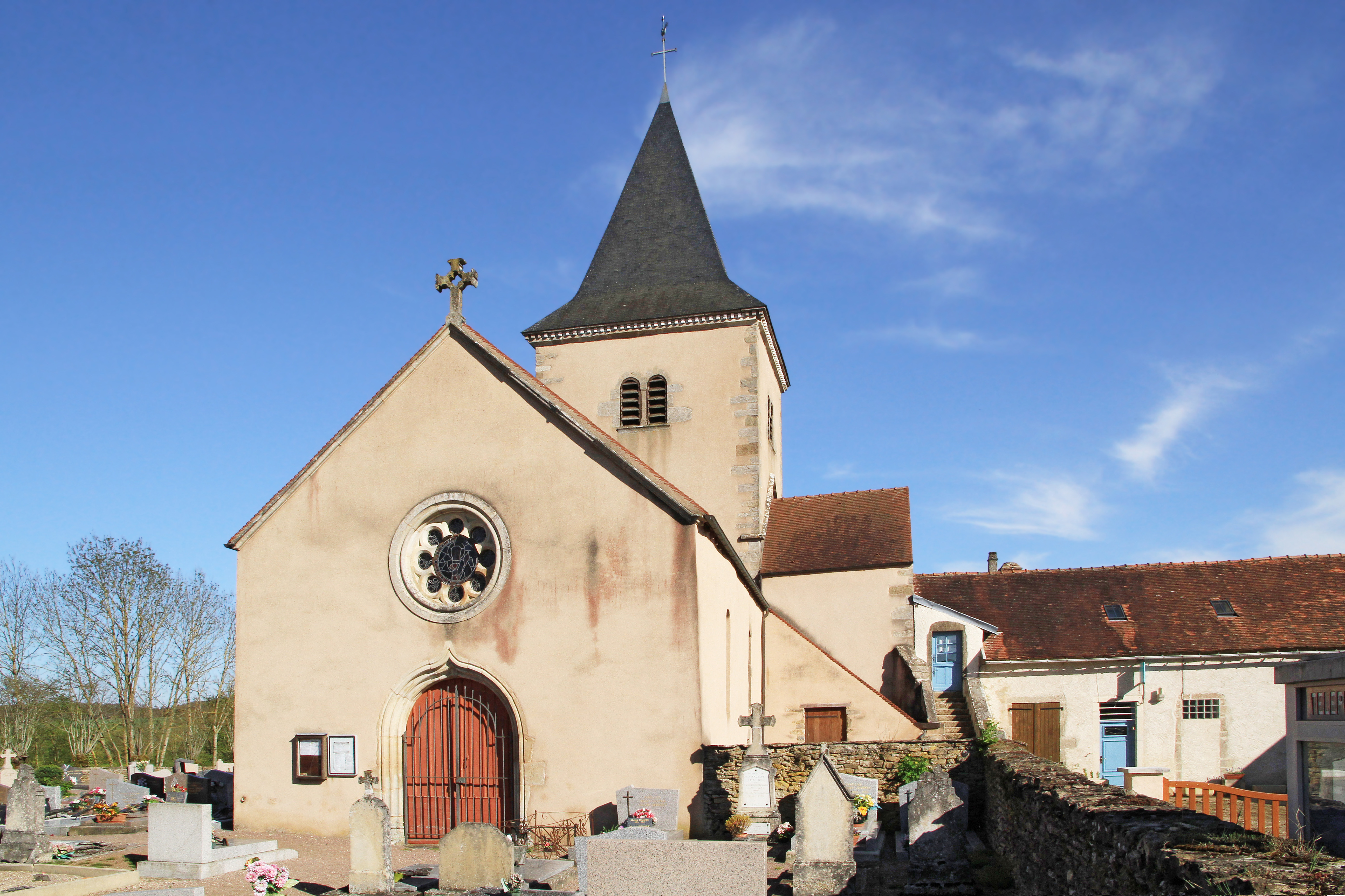 Église Saint-Pierre de Montlay-en-Auxois